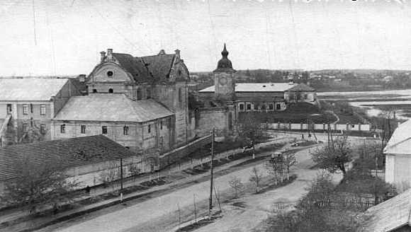 Місто Ізяслав. Костел святого Йосипа і Новозаславський замок.